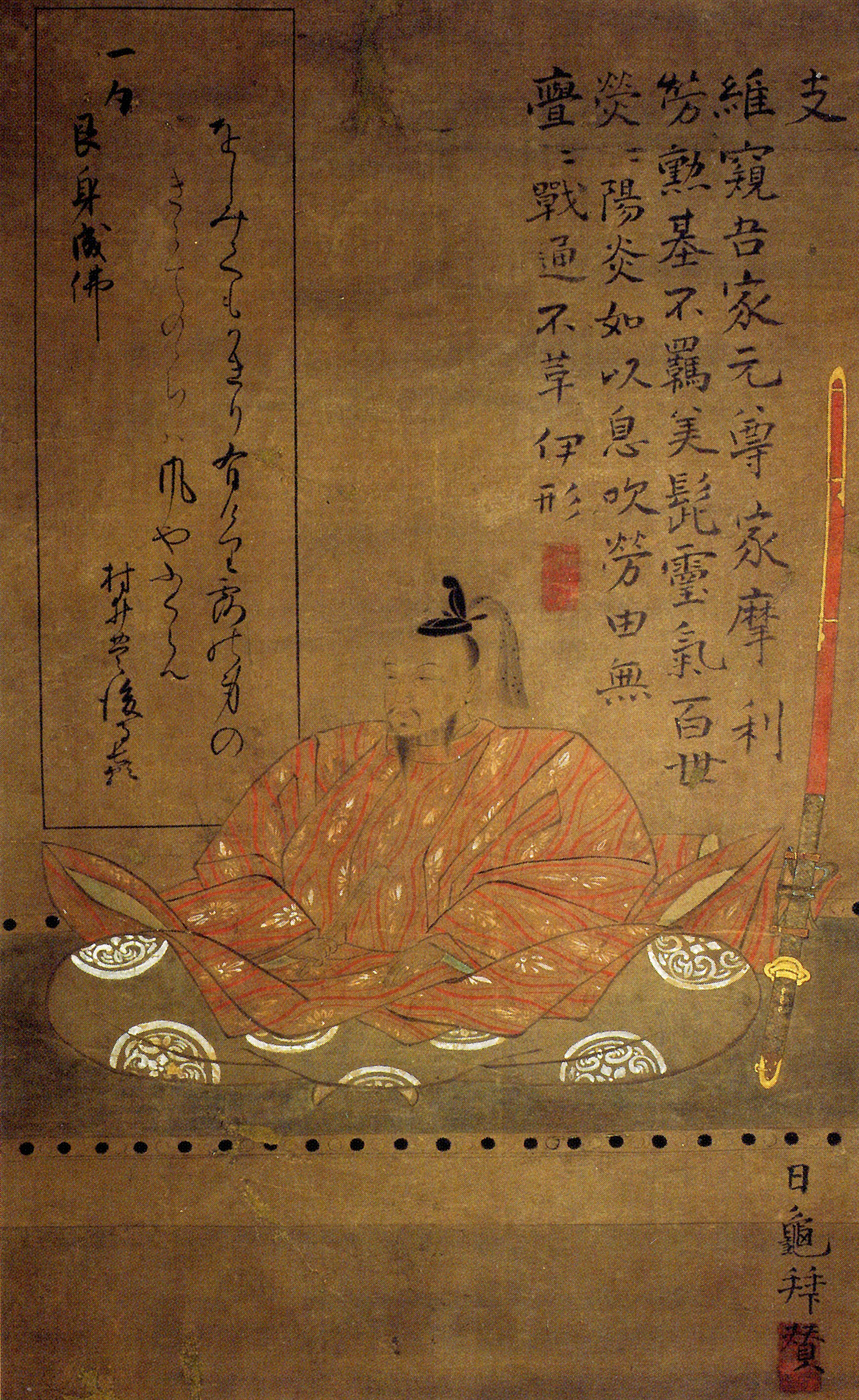 村井長頼の肖像。